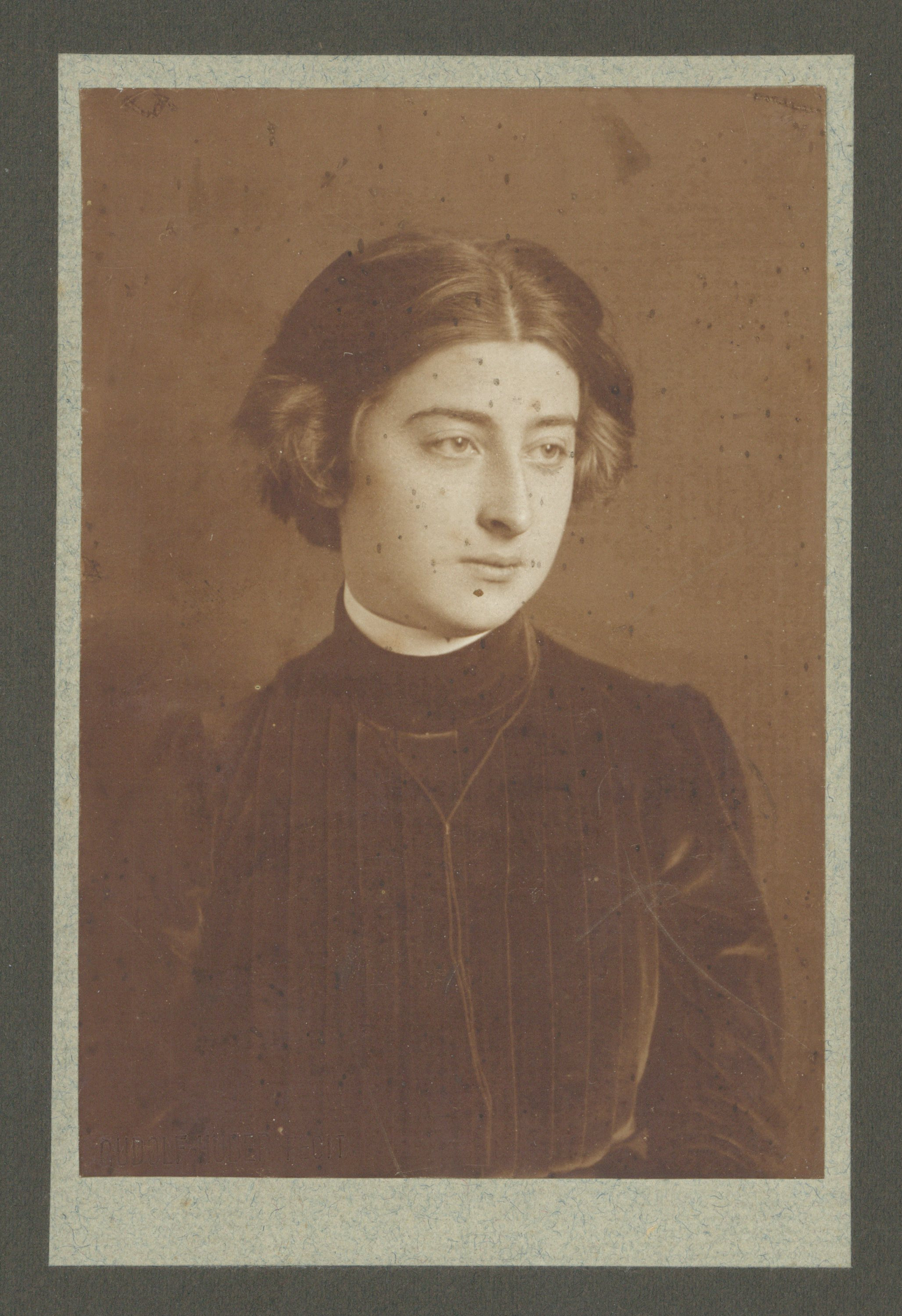 Zofia Zawiszanka, ok. 1904 r.